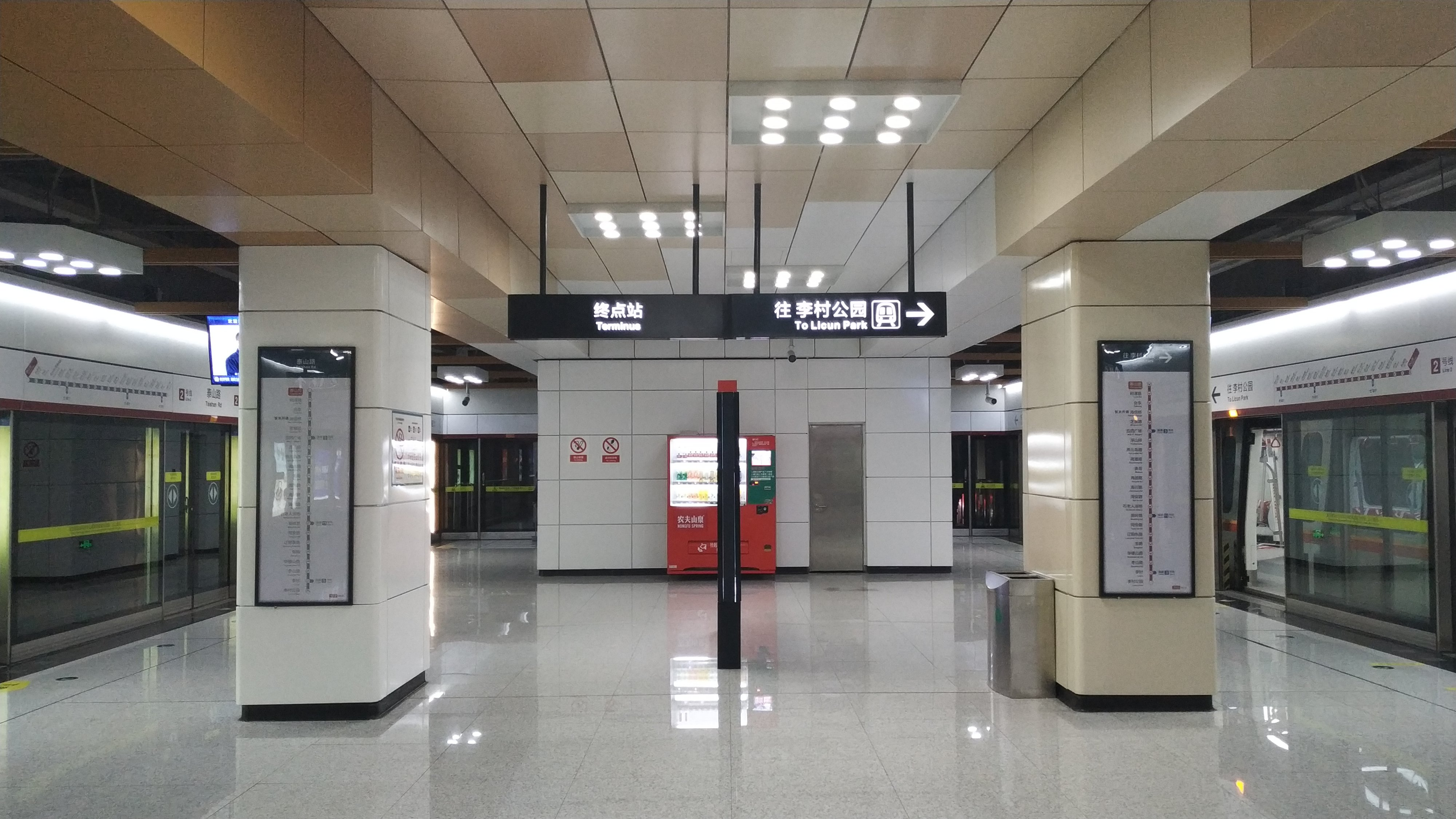 中文（中国大陆）: 泰山路站站台